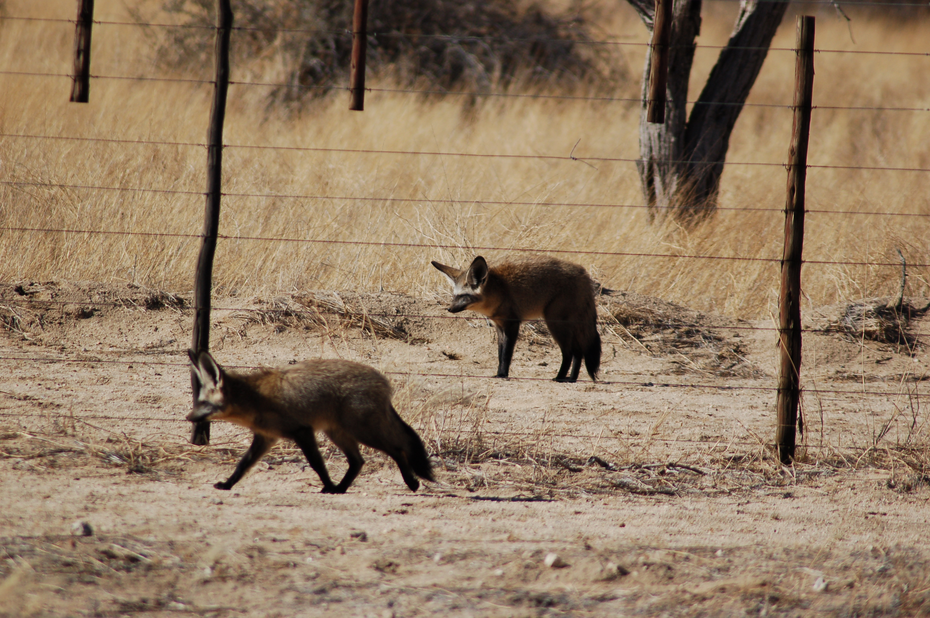 Namib Naukluft National Park, Namibia